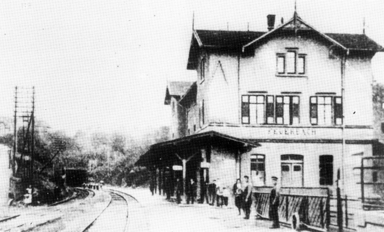 zweiter Bahnhof in Feuerbach mit dem Pragtunnel im Hintergrund